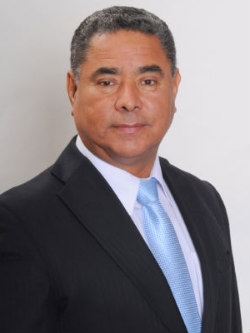 Orlando Severo Vargas Pizarro